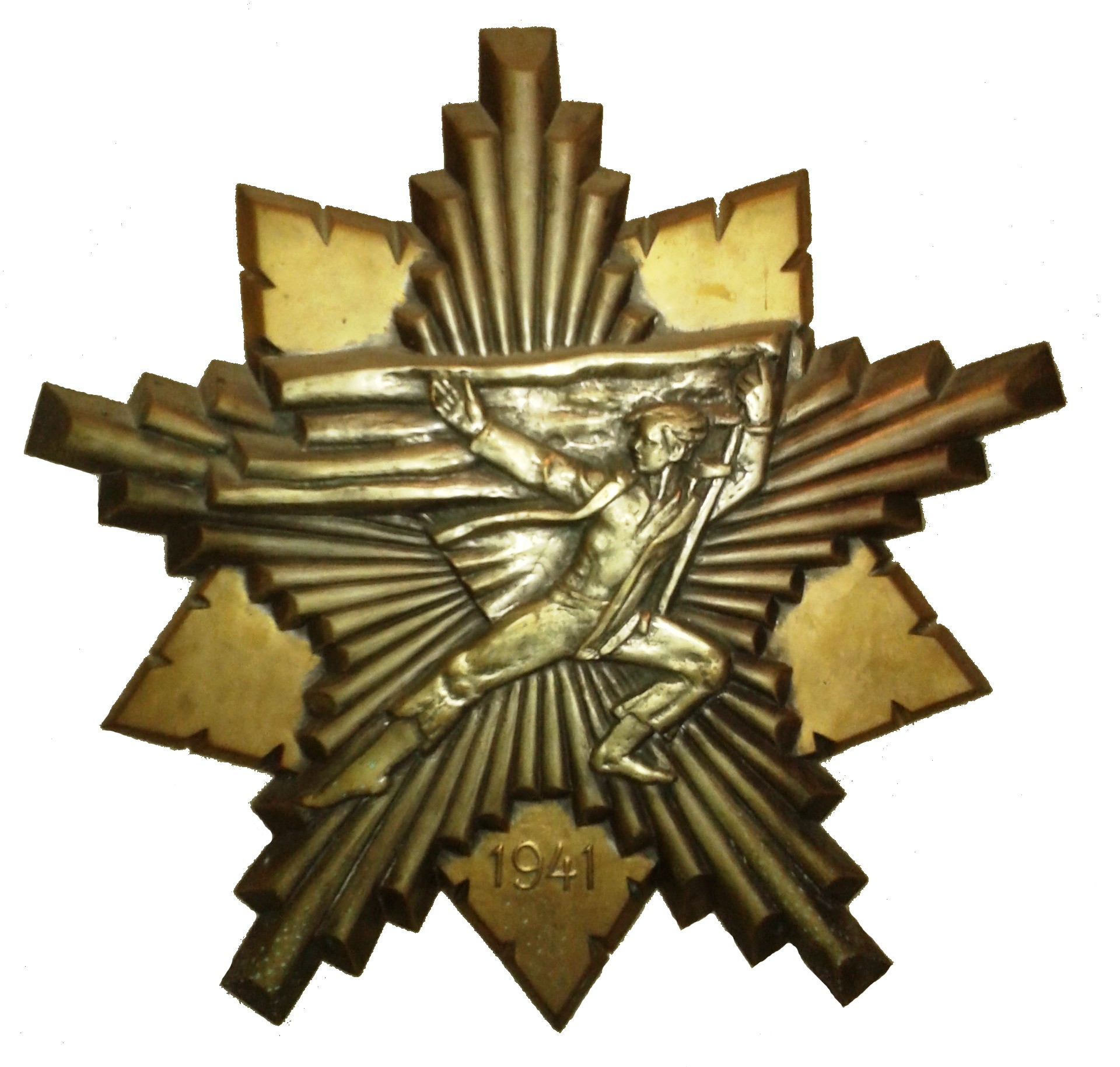 Партизанска споменица 1941. изложбени експонат у сталној поставци Музејa 7. јули 1941. у Белој Цркви, код Крупња